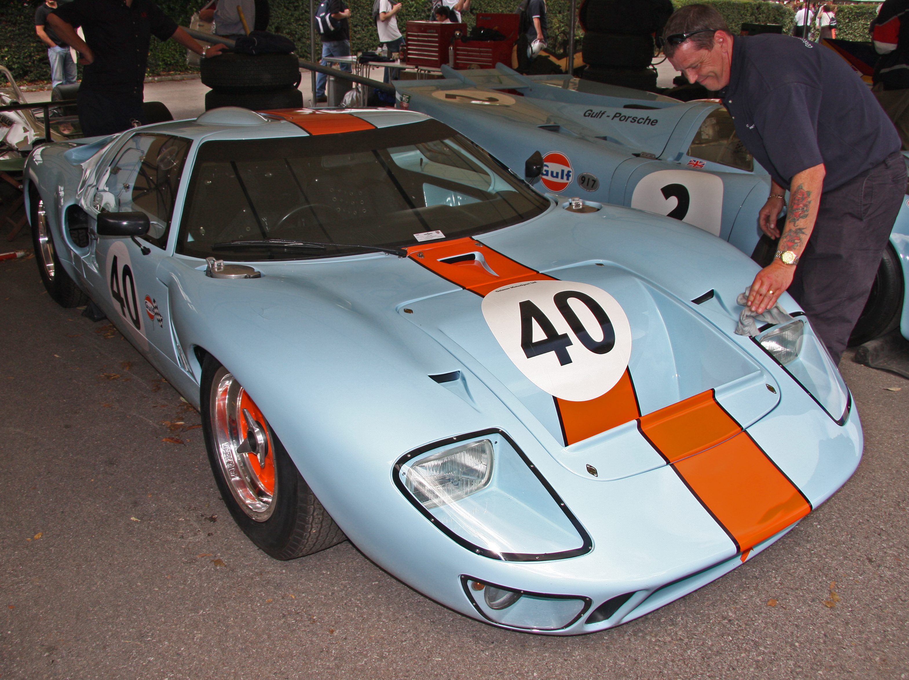 Built 1965. 4.7 litre V8